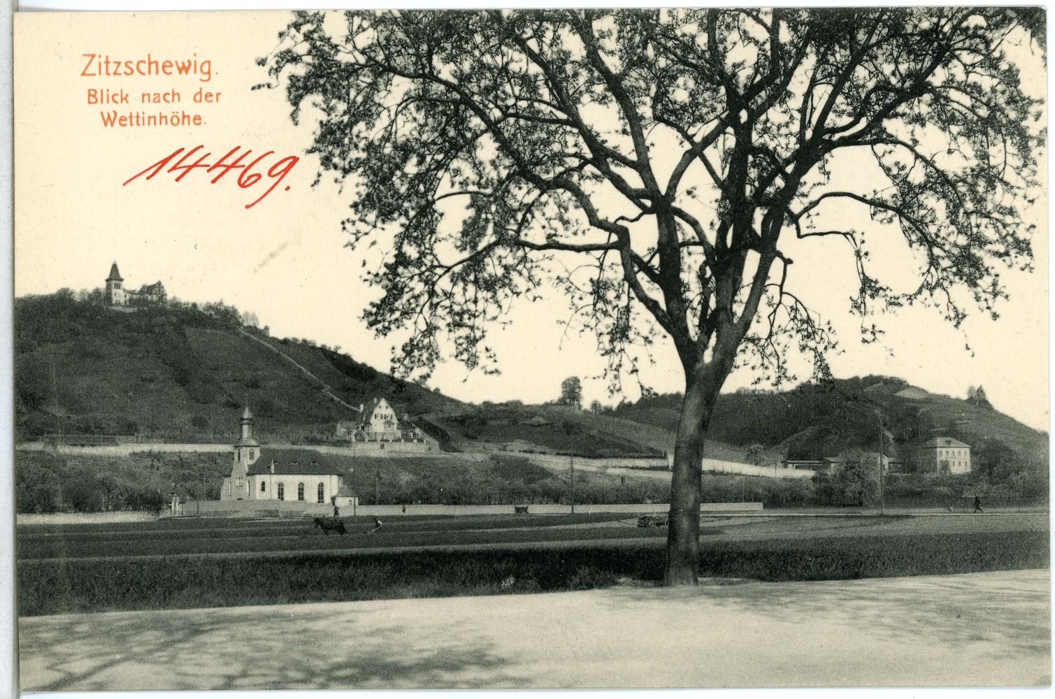 Zitzschewig; Zitzschewig mit Wettinhöhe This postcard is from publisher Brück & Sohn in Meißen ( postcard has a unique number 14469 and is available in a higher resolution at the publisher. This images was uploaded in a cooperation project between Wikipedians and the publisher.